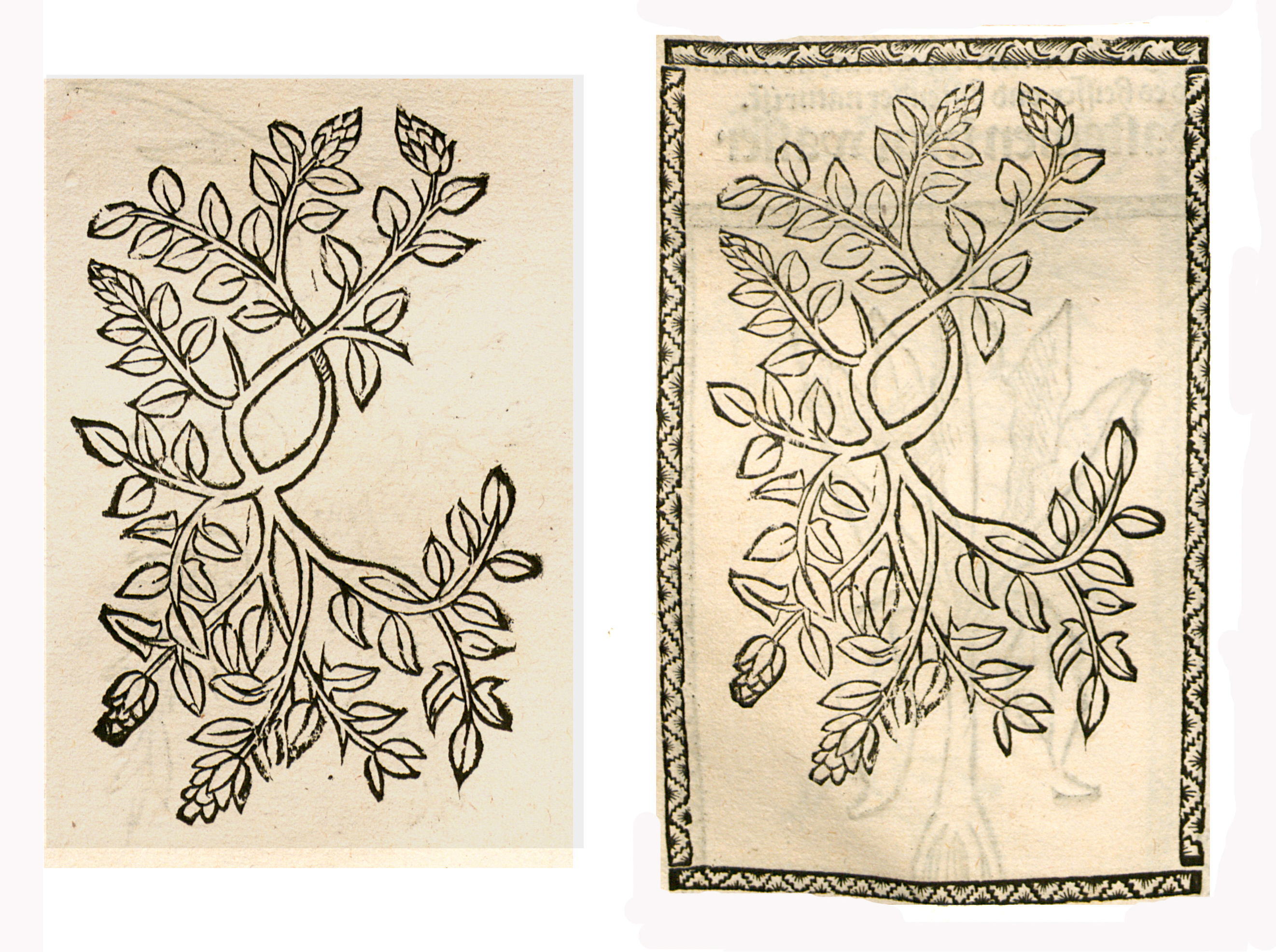 Abbildung von: Quendel (Thymus serphyllum)